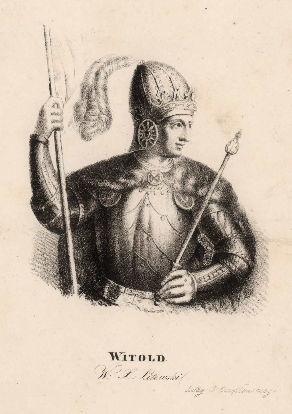 Беларуская (тарашкевіца): Партрэт Вітаўта Вялікага (Vitaŭt Vialiki)